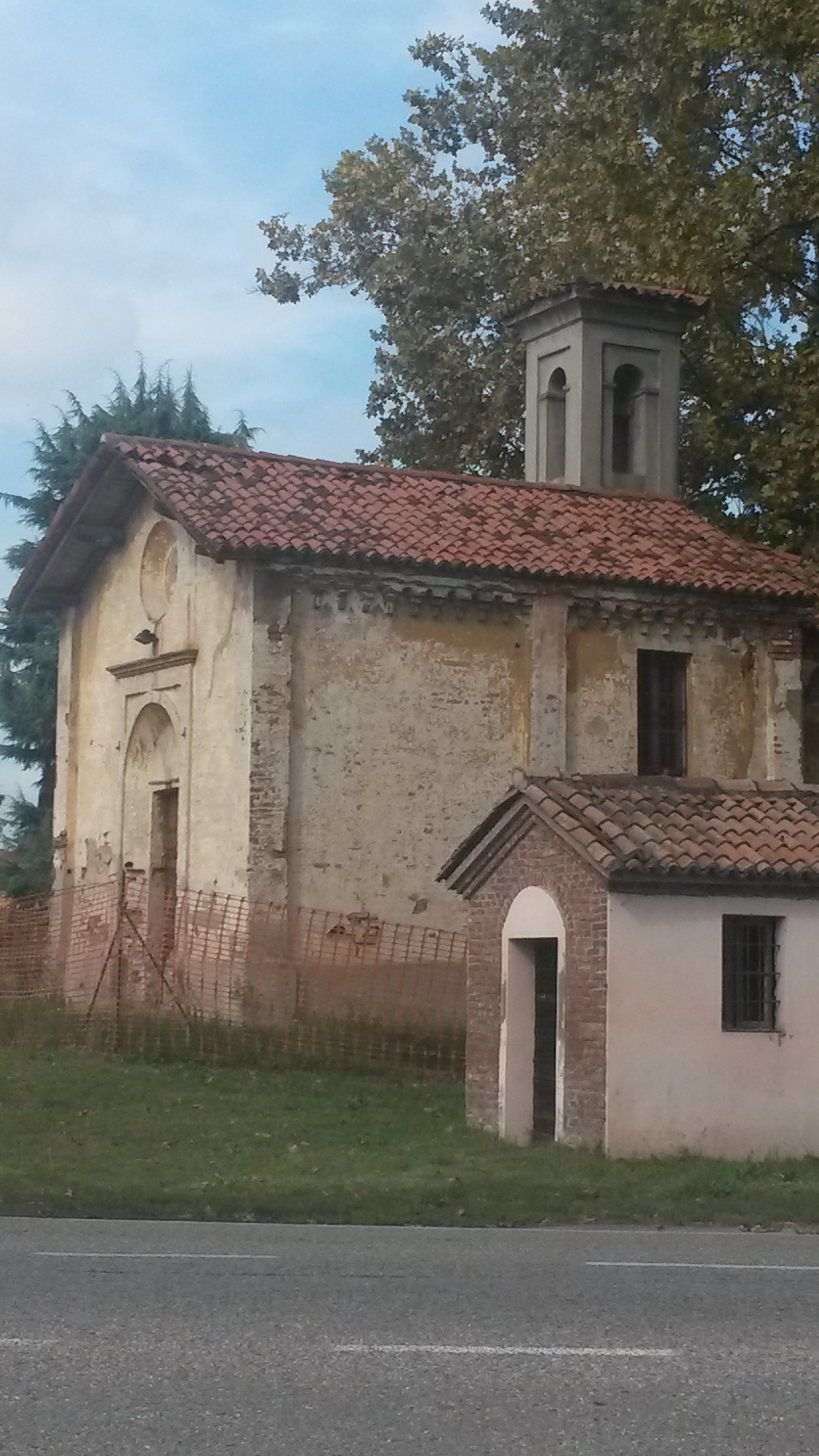 Cappella di San Rocco a Fallavecchia, Morimondo (MI)